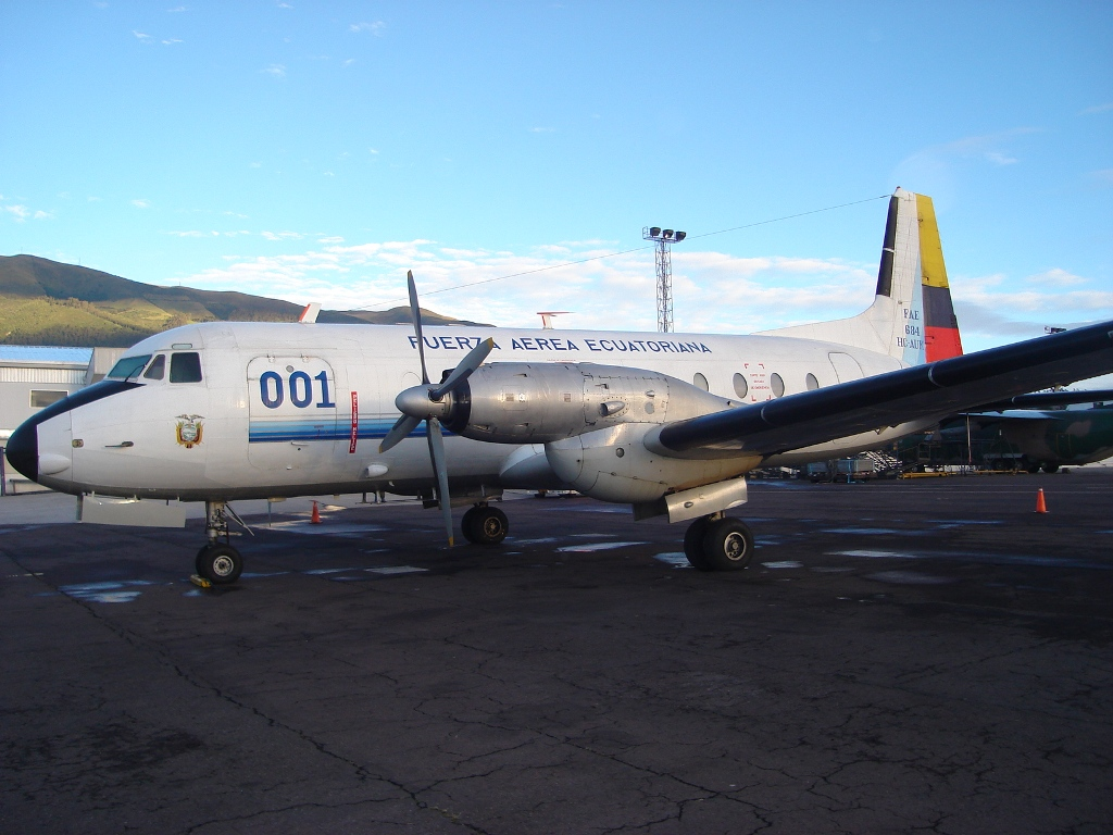 Avion Avro de la Fuerza Aérea Ecuatoriana